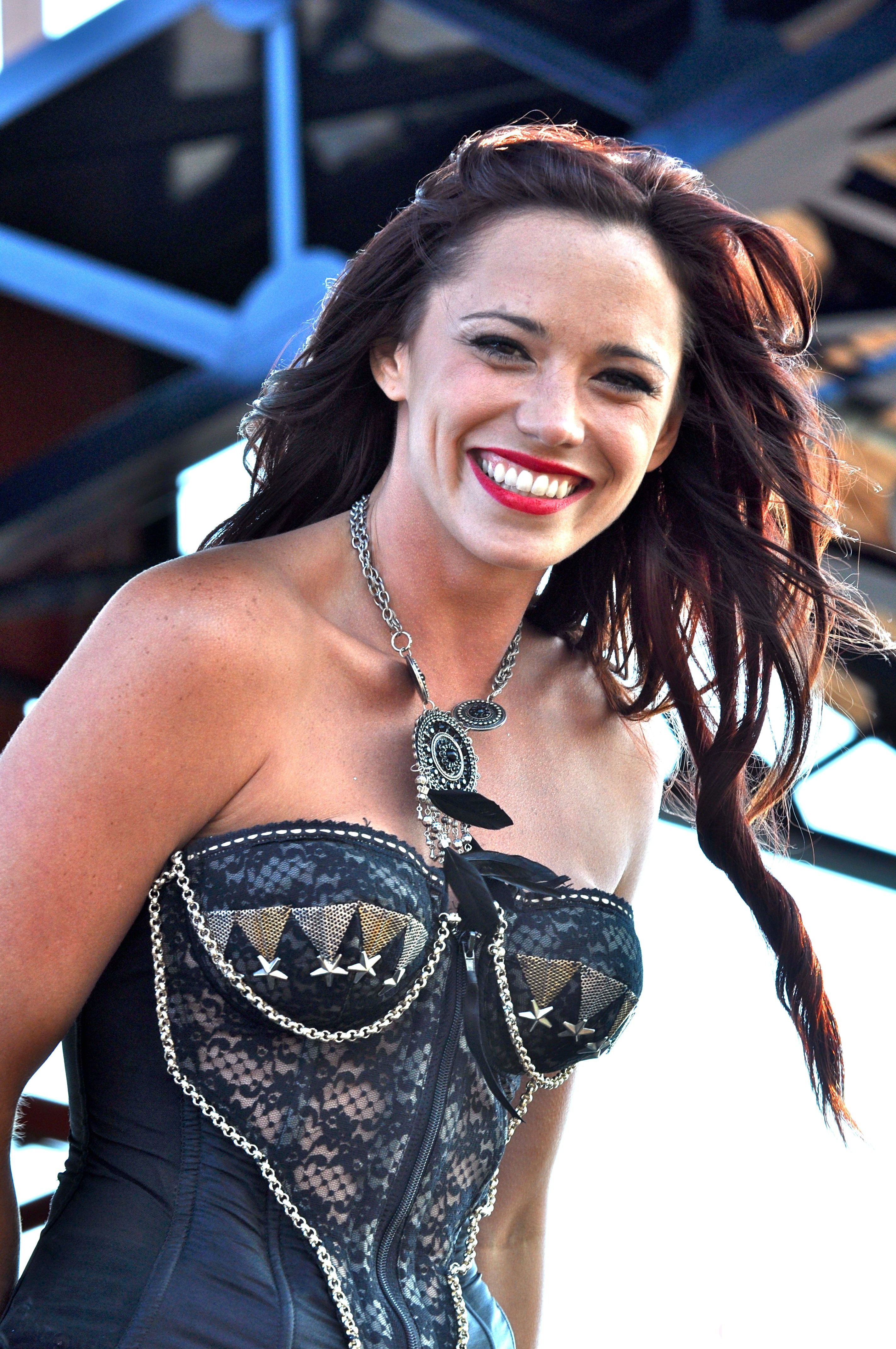 Jessica Sutta - DS Pride -DSC_2496- 9.1.12